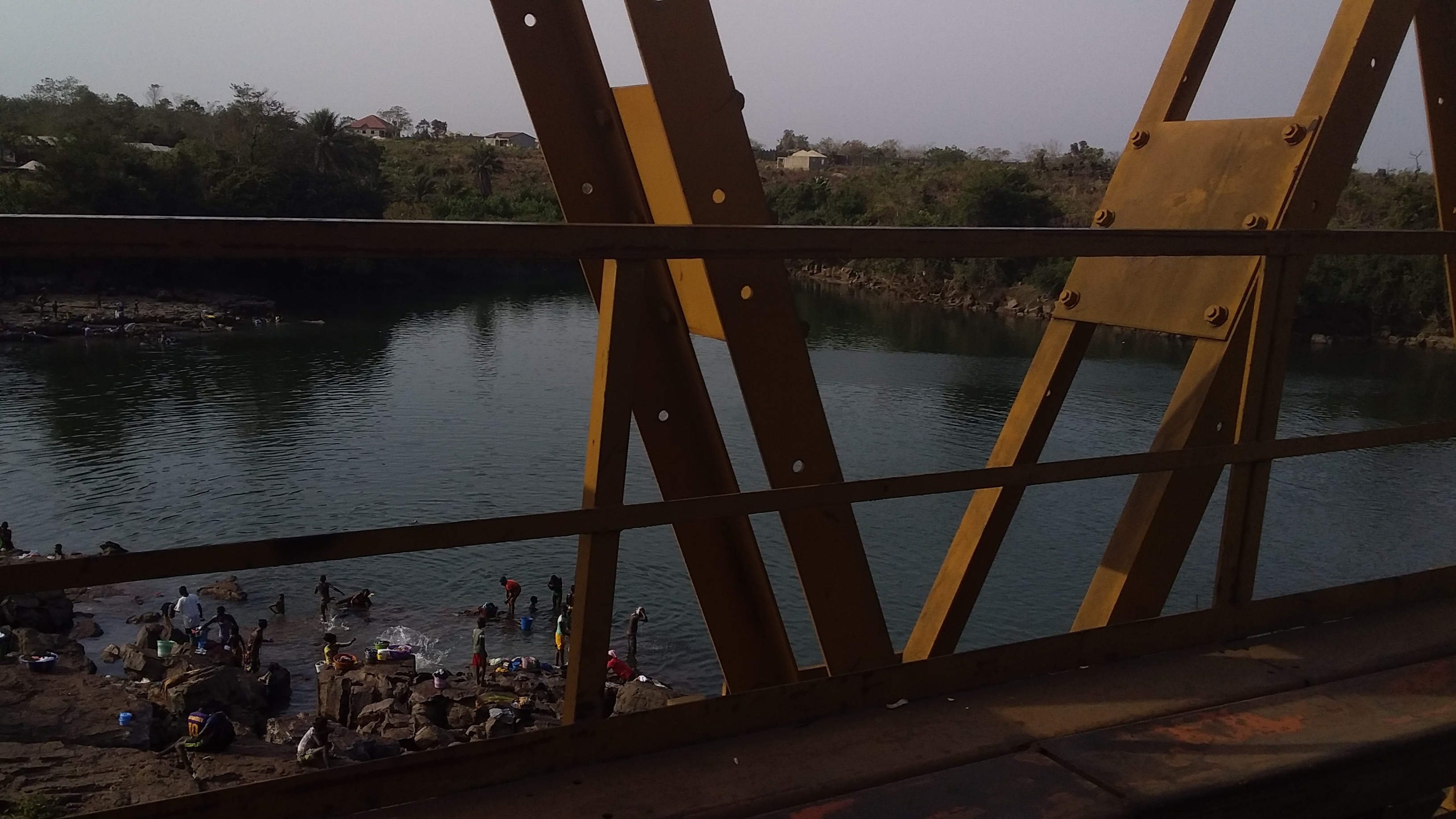 Pontpore This is an image with the theme "Africa on the Move or Transport" from: Guinea